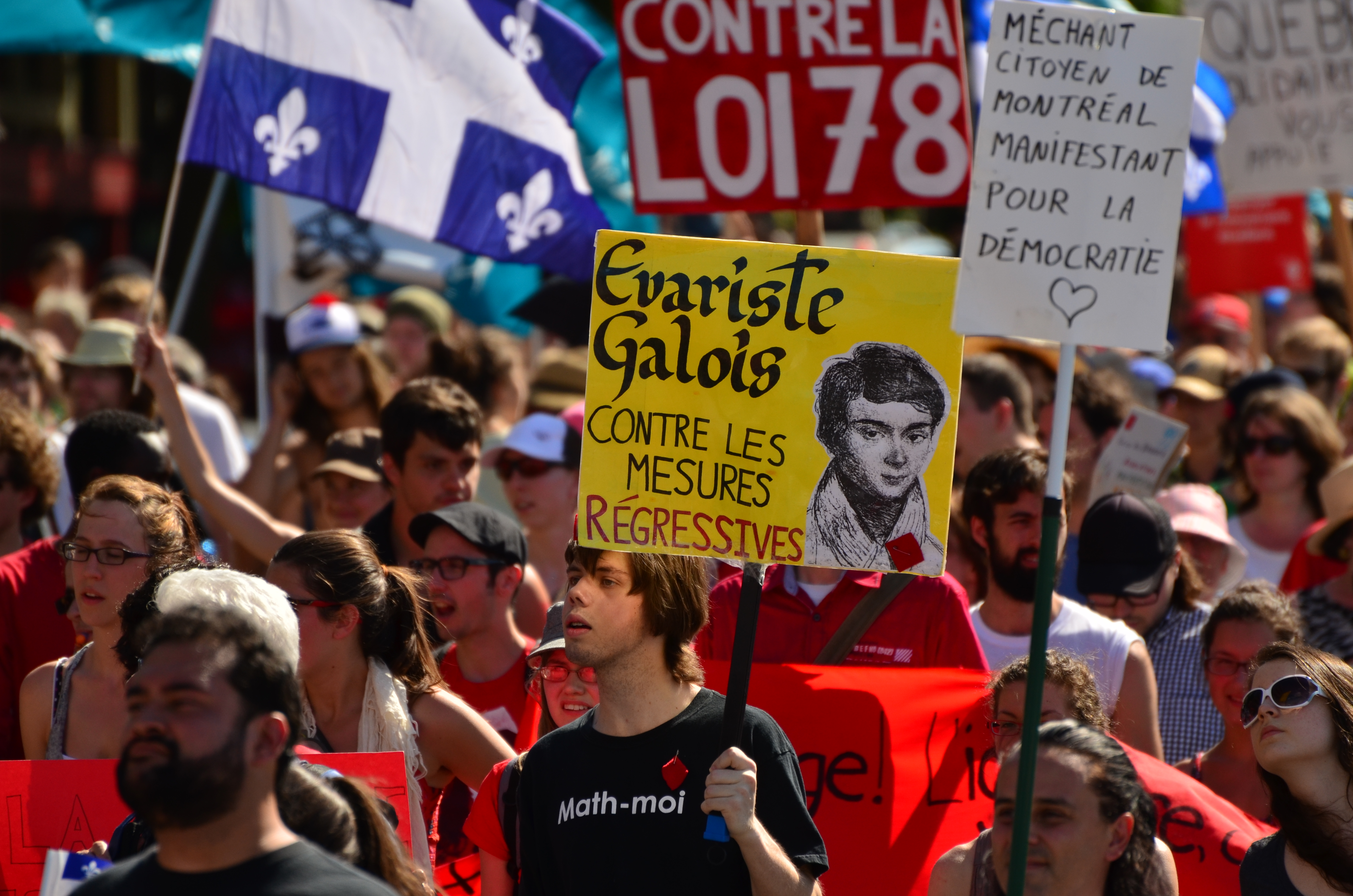 À la manifestation contre la hausse des frais de scolarité du 22 juin 2012 à Québec.